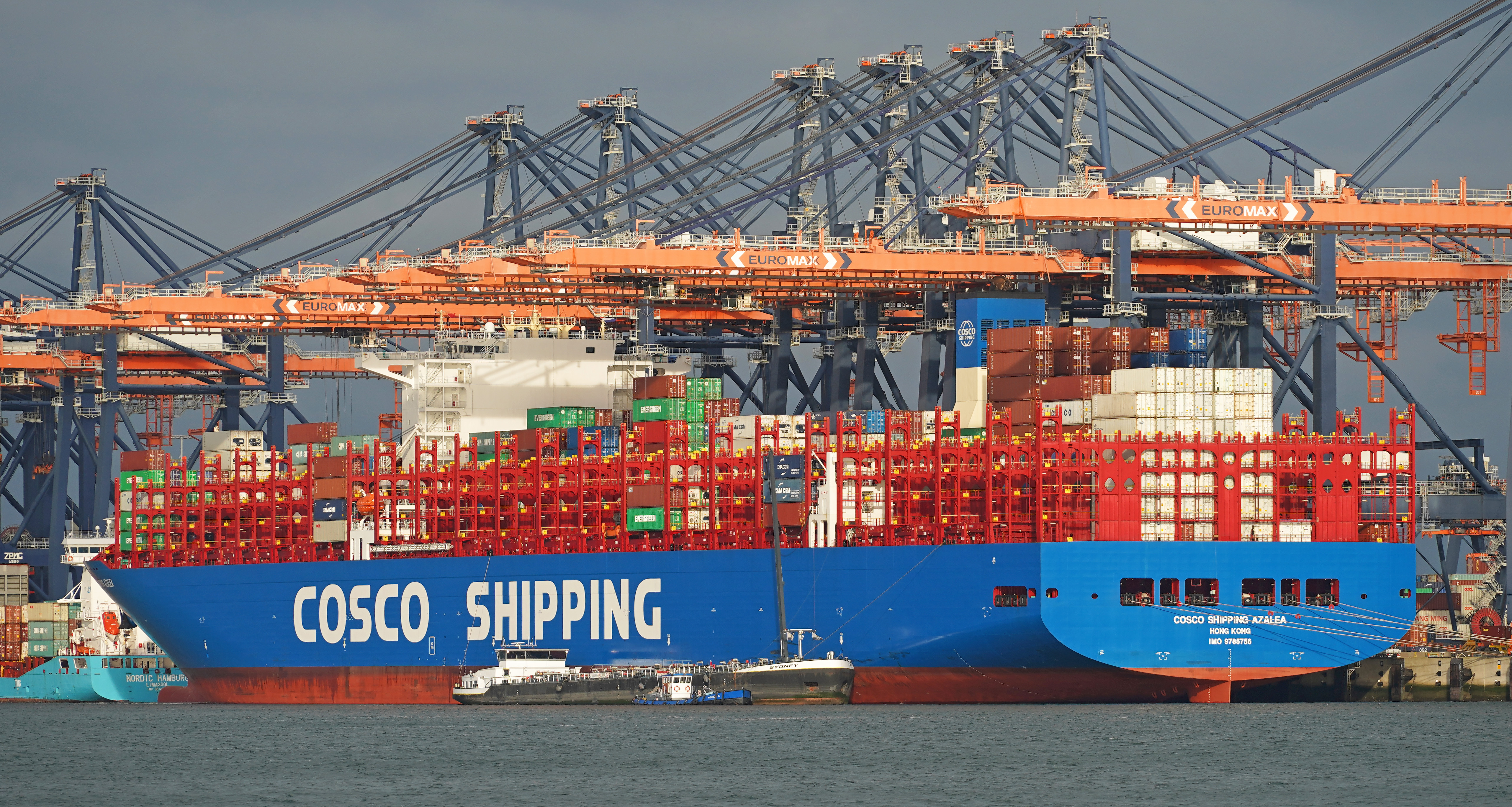 Yangtzehaven , gezien vanaf DE NIEUWE PRINS 26-10-2019